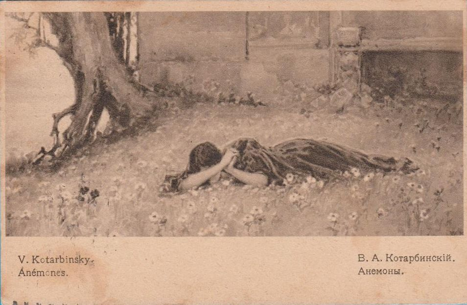 картины художника Котарбинского Вильгельма Александровича (1948-1921)